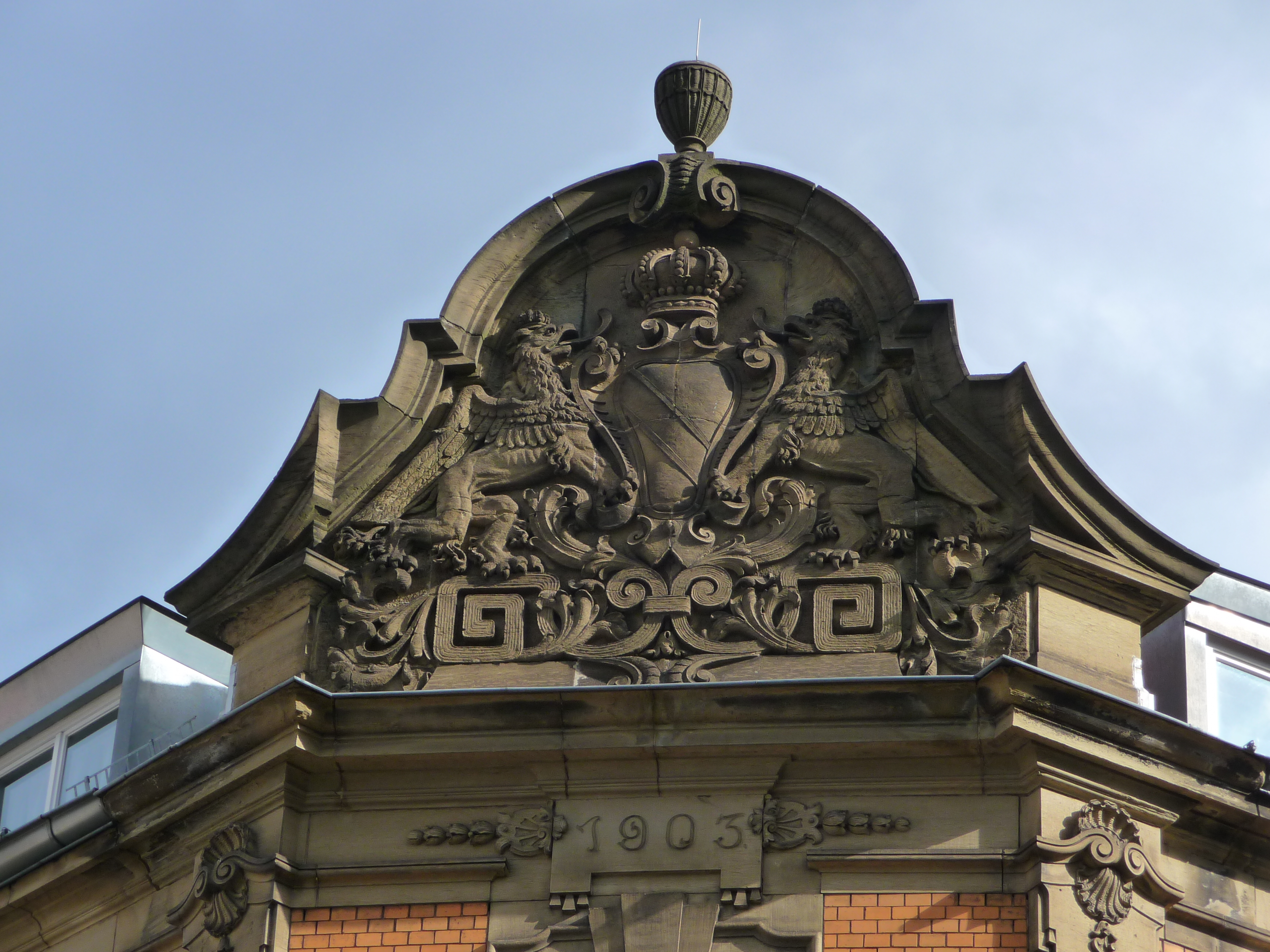 Detail an der Fassade des Amtsgerichts in Weinheim (Rhein-Neckar-Kreis, Baden-Württemberg, Deutschland)